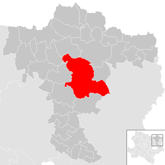 Bezirk Mistelbach